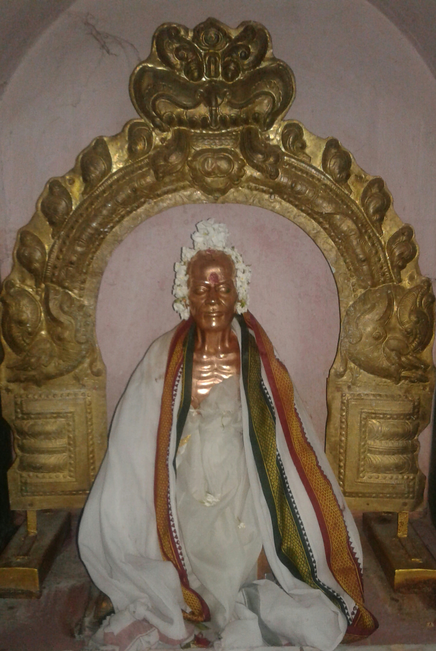 காட்டுப்புத்தூர் சித்தர் நாராயண பிரம்மேந்தரின் திருவுருவச் சிலை பகுப்பு:சித்தர்கள்